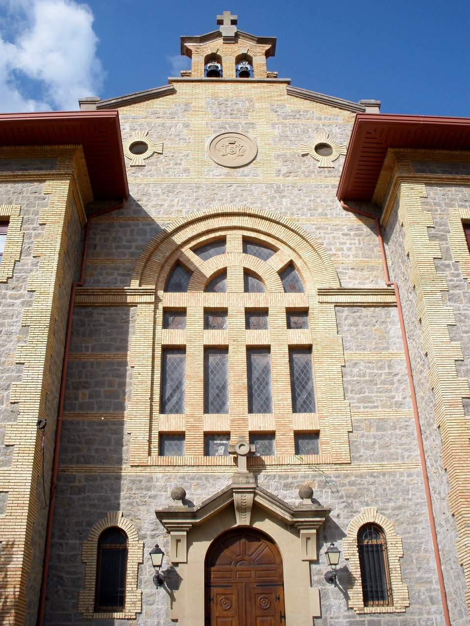 Iglesia de San Blas (Burlada, Navarra)